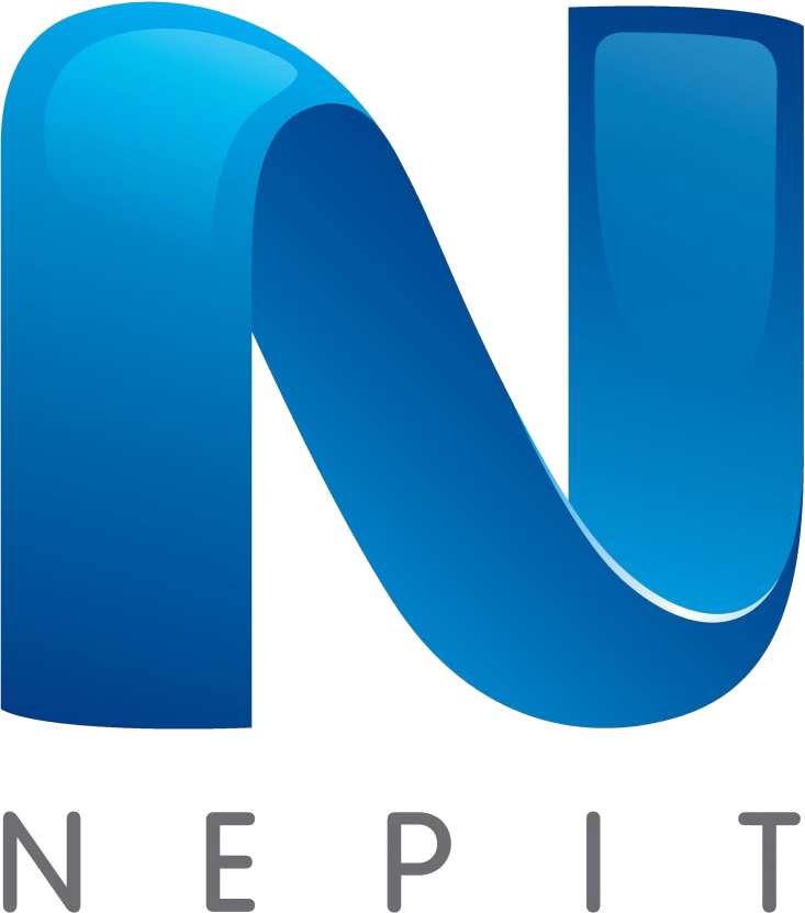 Logo: New Hellenic Radio, Internet and Television (NERIT) / Νέα Ελληνική Ραδιοφωνία, Ίντερνετ και Τηλεόραση (ΝΕΡΙΤ)